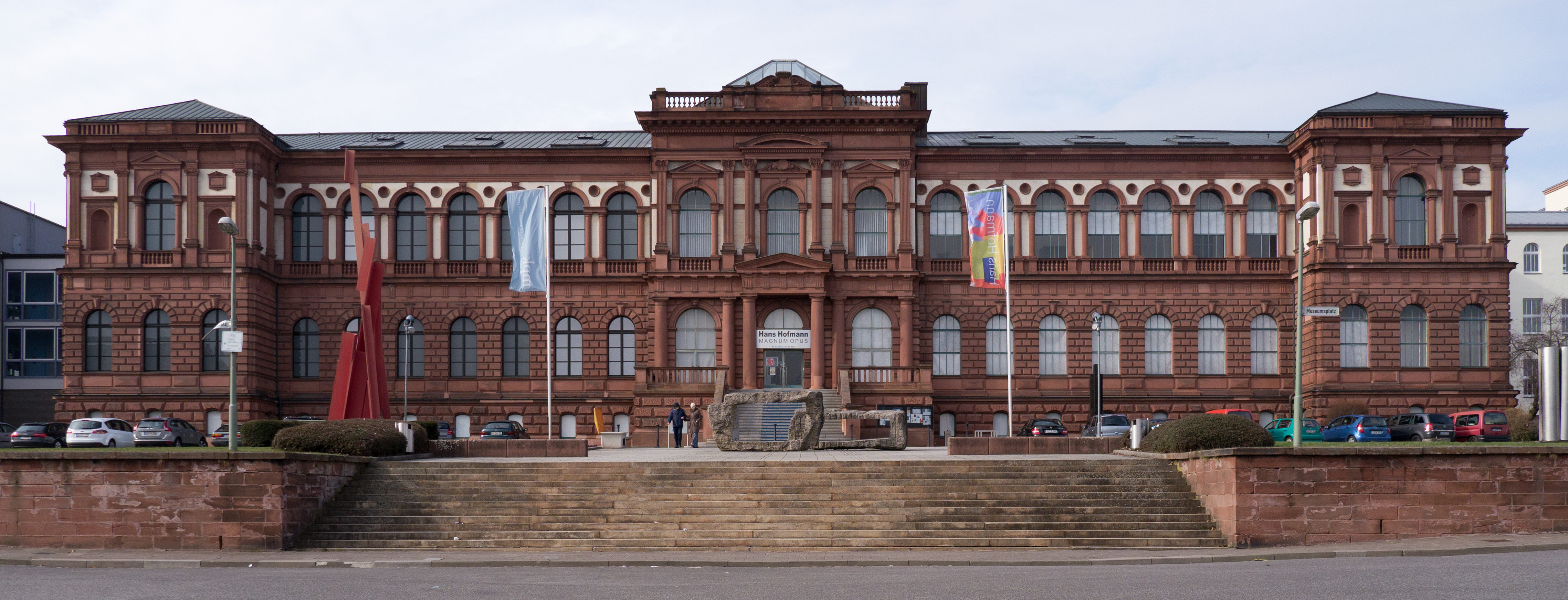 Außenansicht des Museum Pfalzgalerie Kaiserslautern